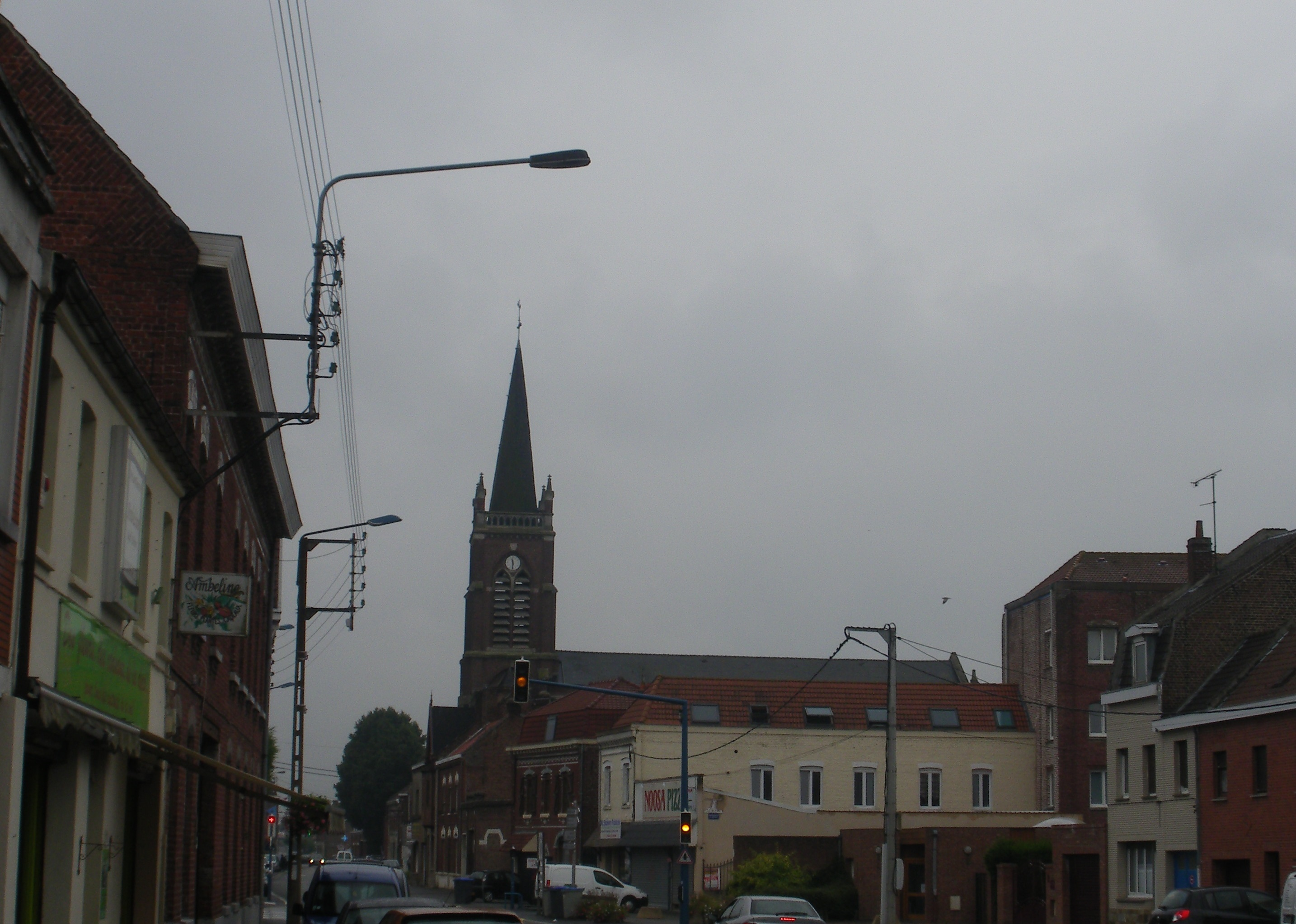 Vue de l'église de Provin.